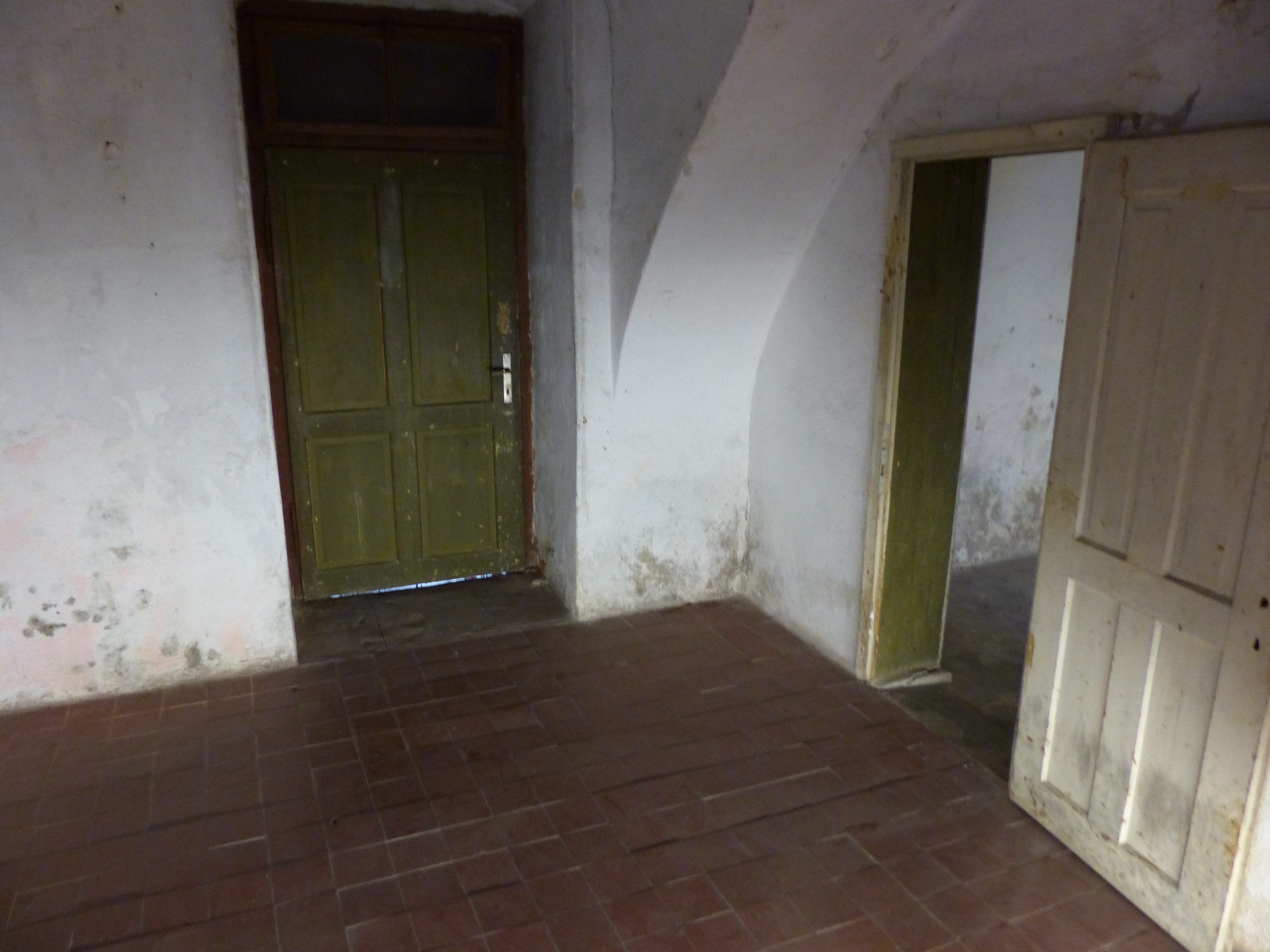 Schloss Hartheim Leichenraum: Hier wurden die Leichen zwischengelagert, bevor sie im Krematorium verbrannt wurden.